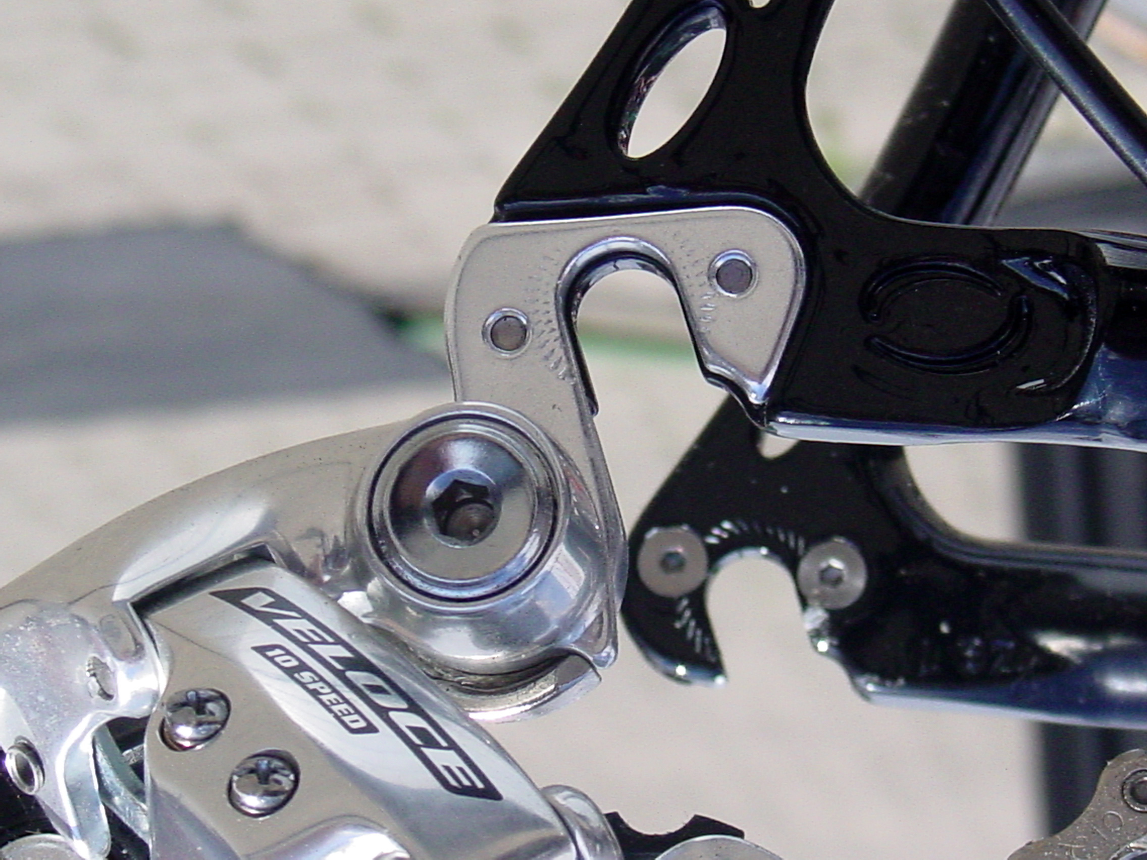 Fahrradtechnik